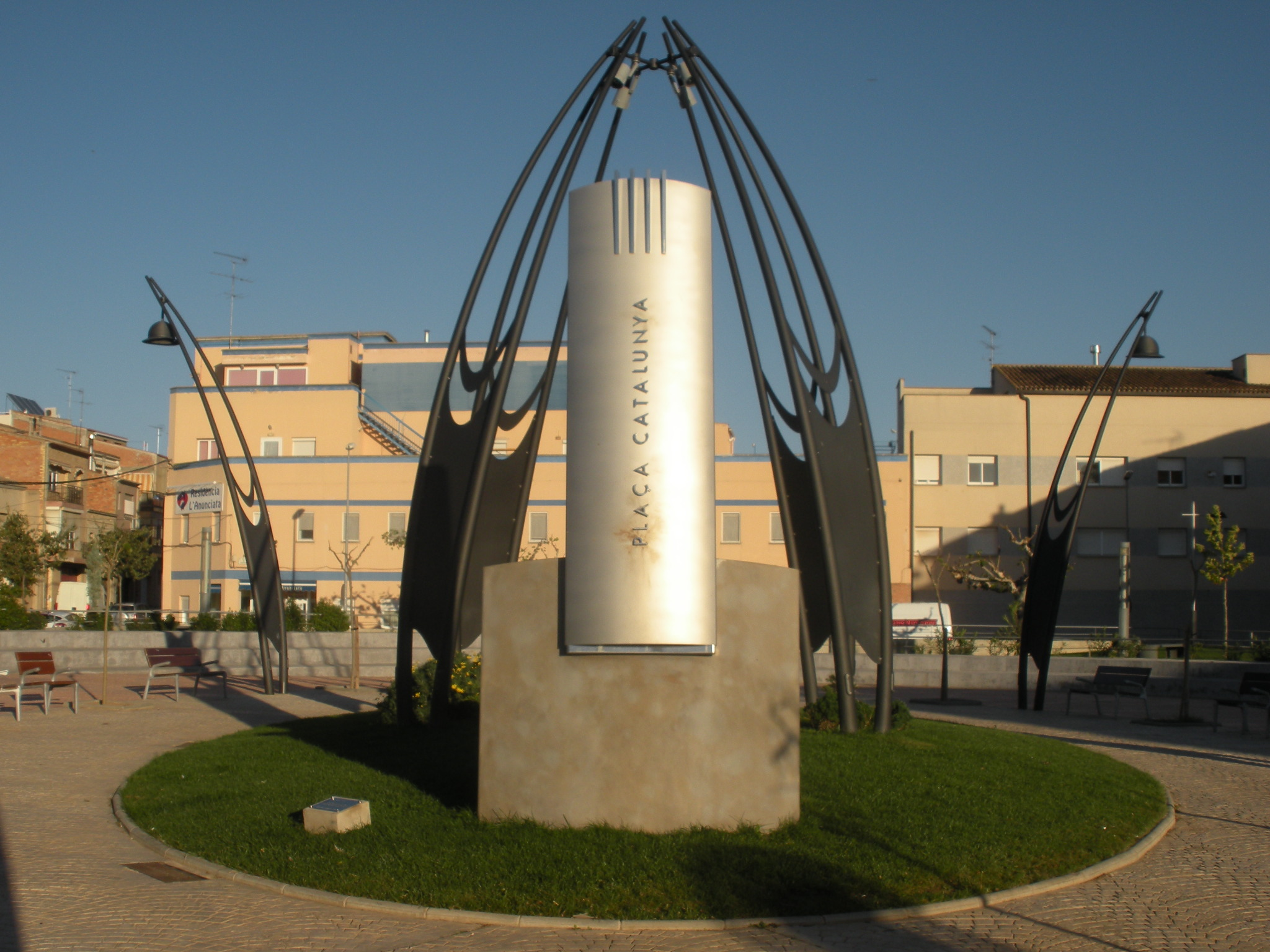 Plaça Catalunya